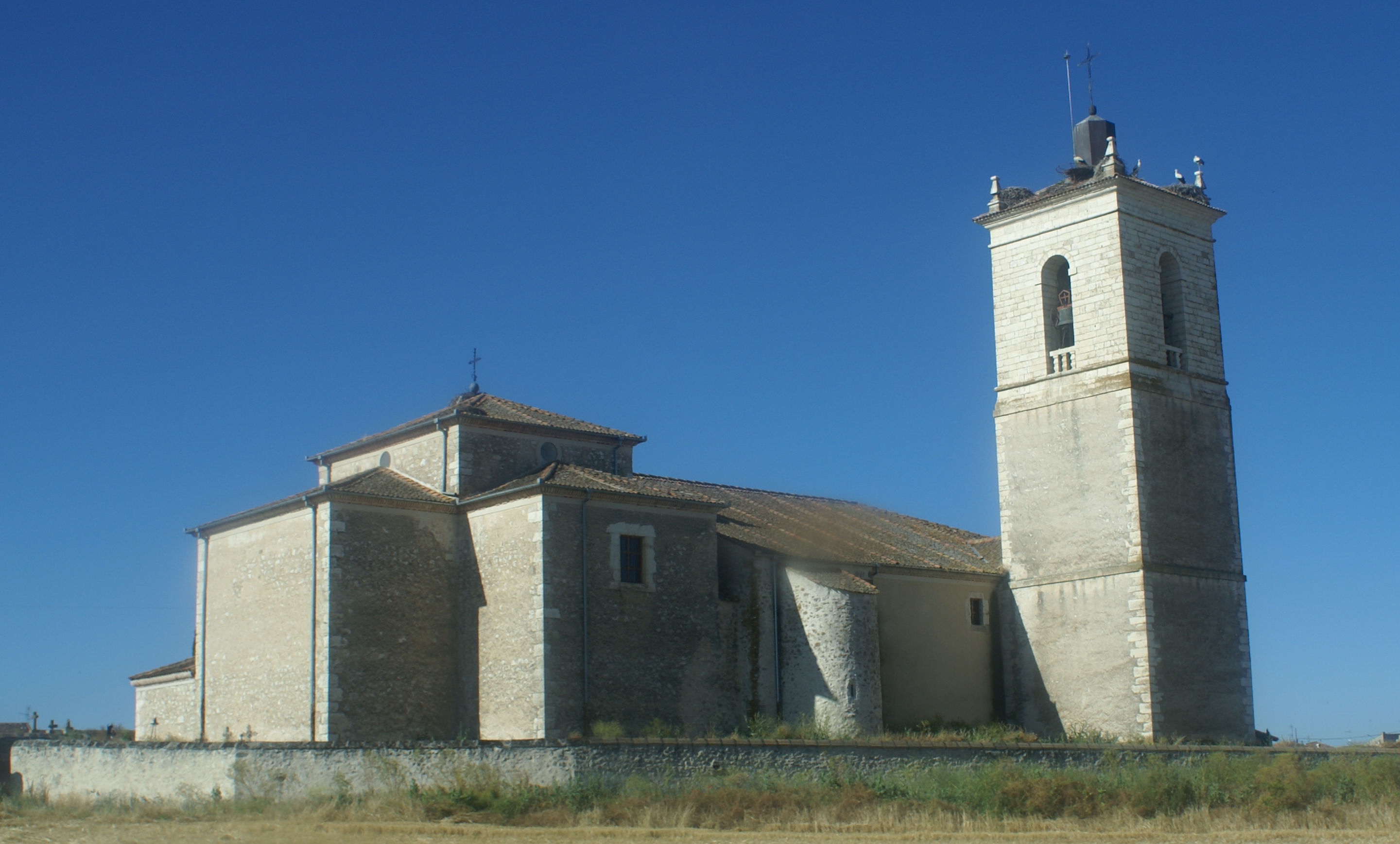 Iglesia de San Pedro en Cátedra de Hontalbilla, Segovia